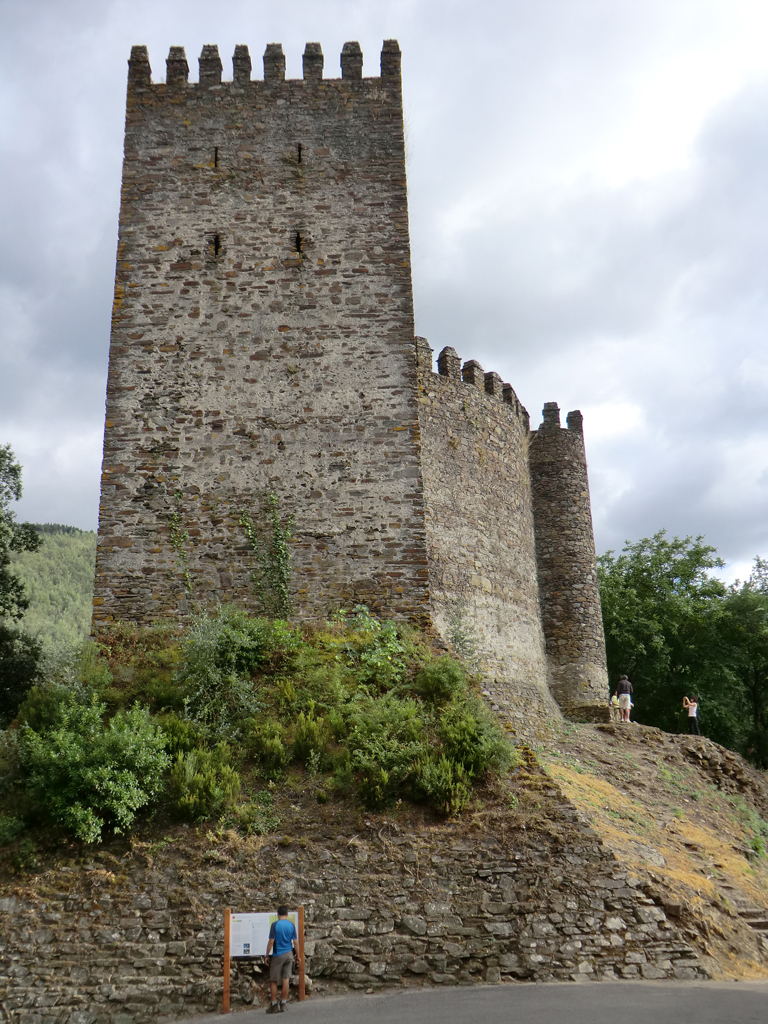 O Castelo da Lousã, também conhecido como Castelo de Arouce, localiza-se a cerca de dois quilômetros da vila, Freguesia e Concelho de Lousã, no Distrito de Coimbra, em Portugal.